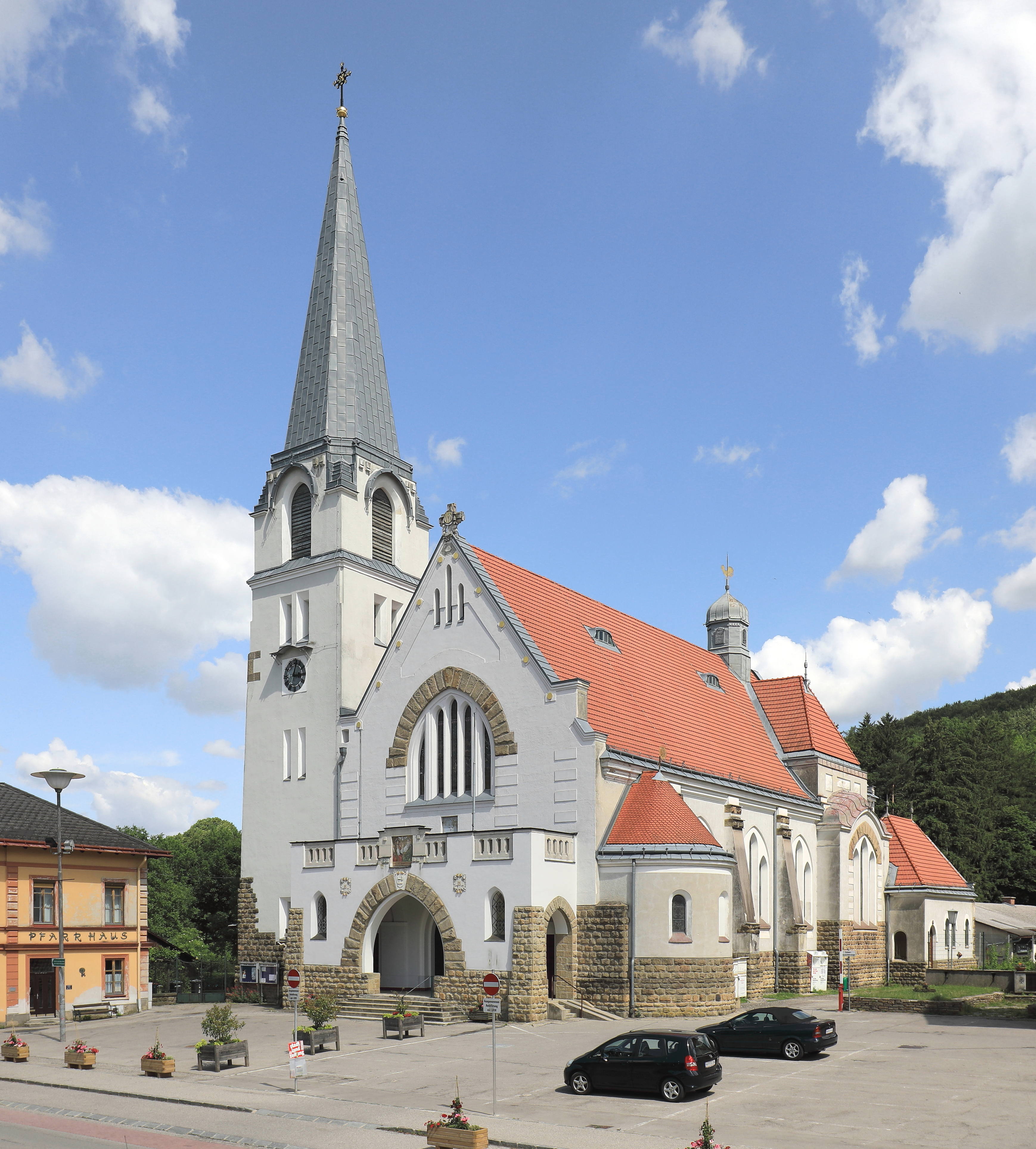 Westansicht der röm.-kath. Pfarrkirche hl. Dreifaltigkeit in der niederösterreichischen Stadtgemeinde Pressbaum.Von 1906 bis 1908 nach Plänen der Architekten Max Hegele und August Rehak als Kaiser-Franz-Joseph-Jubiläums-Kirche errichtet. Die Kirche mit ihrem speziellen Stil stellt in der Sakralarchitektur Niederösterreichs ein bedeutendes Denkmal dar und steht unter Denkmalschutz.